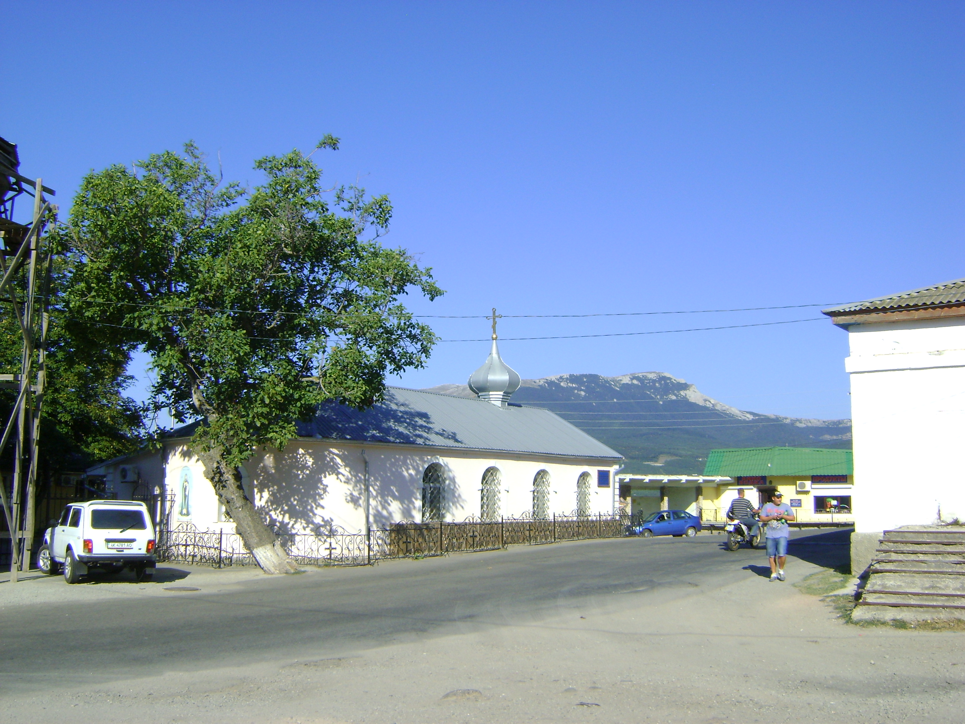 2013-й рік.